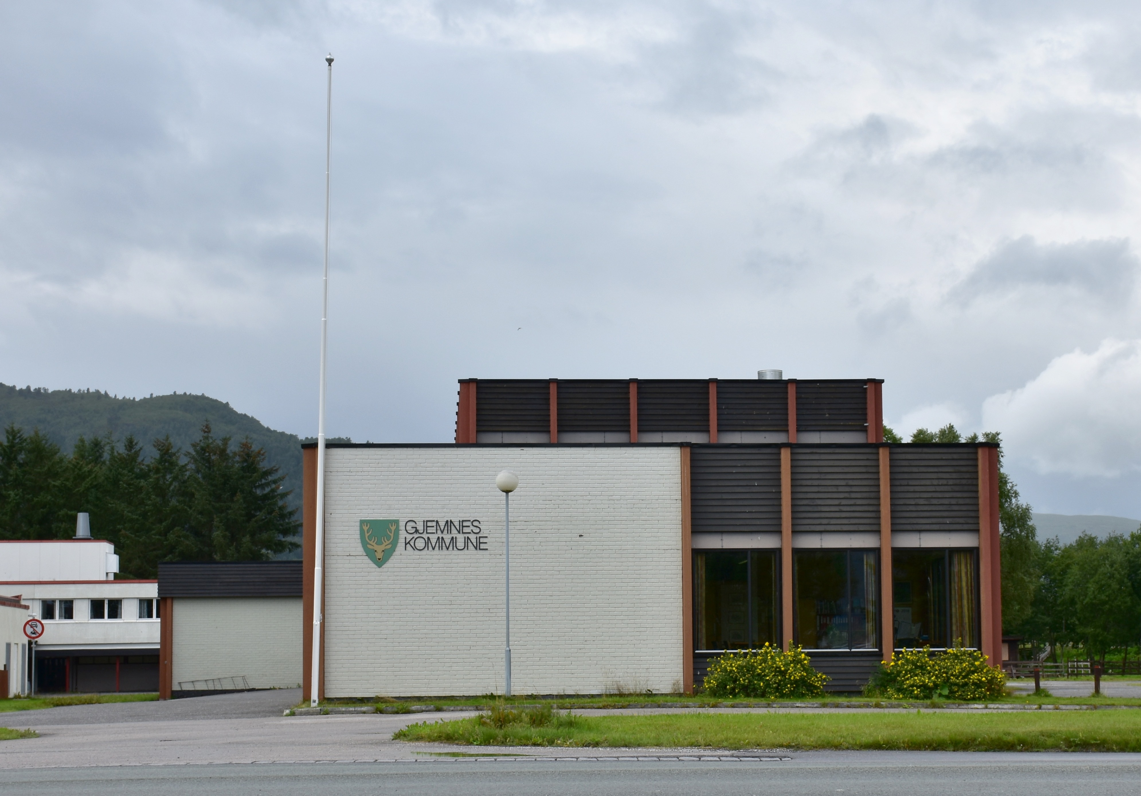 Gjemnes kommunehus, Batnfjordsøra